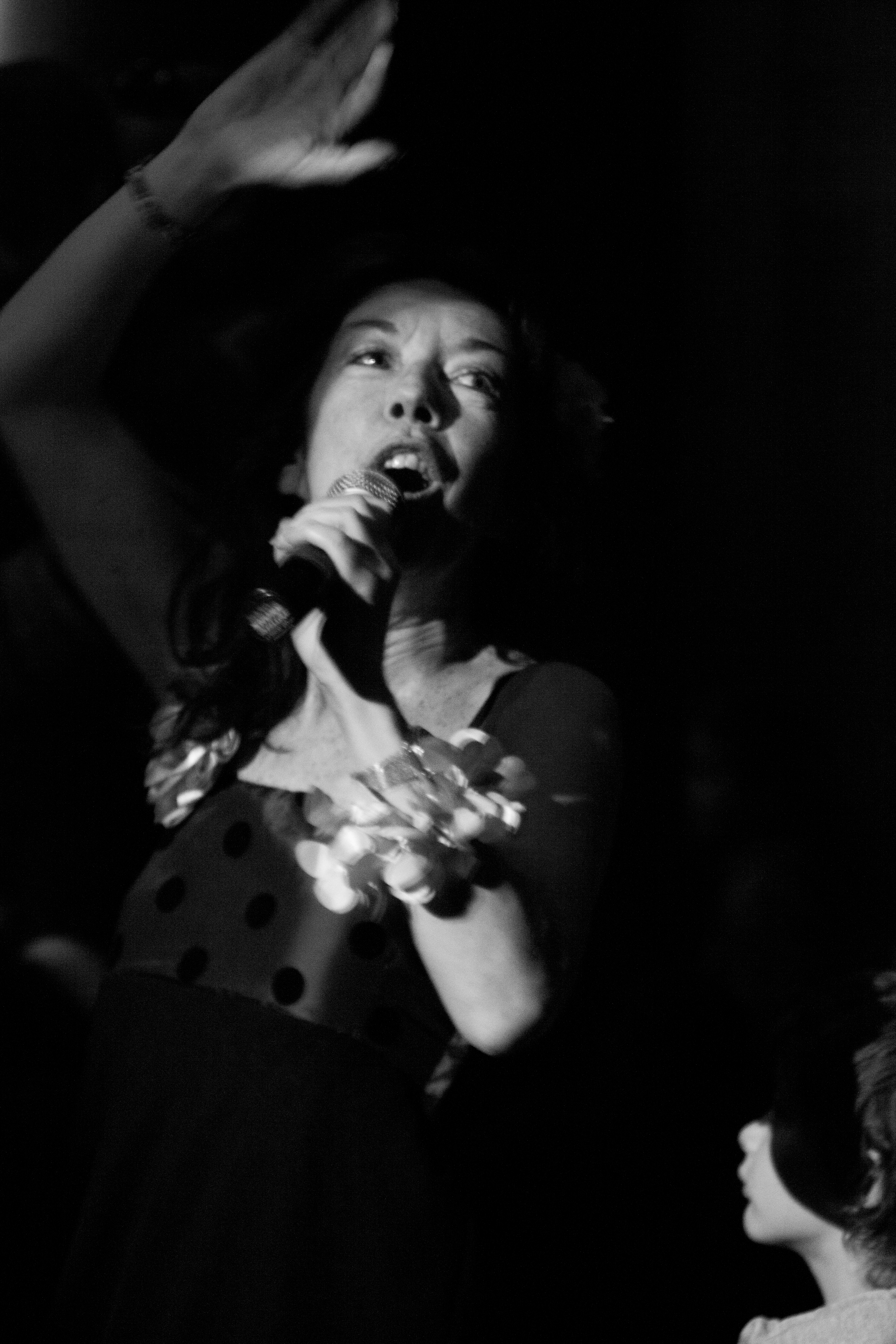 año 2012